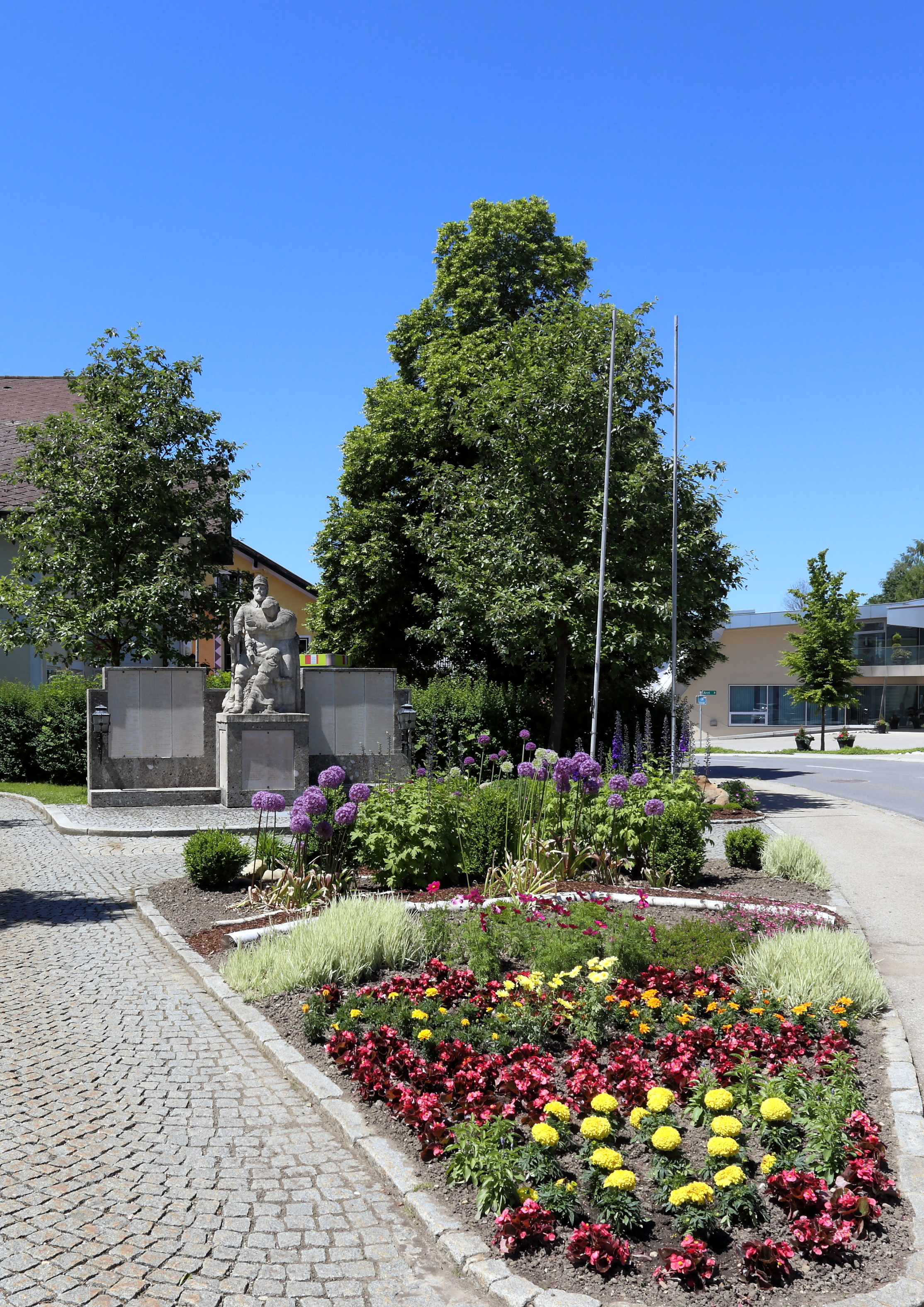 Das nördlich der Pfarrkirche befindliche Soldatendenkmal der oberösterreichischen Gemeinde St. Johann am Walde.